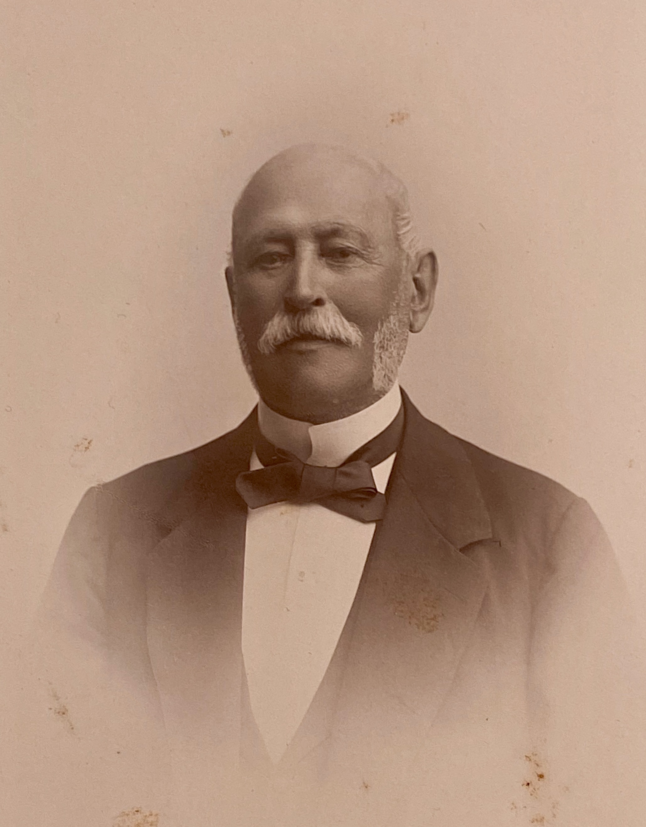 Israel Ludvig af Ström (1821-1904)